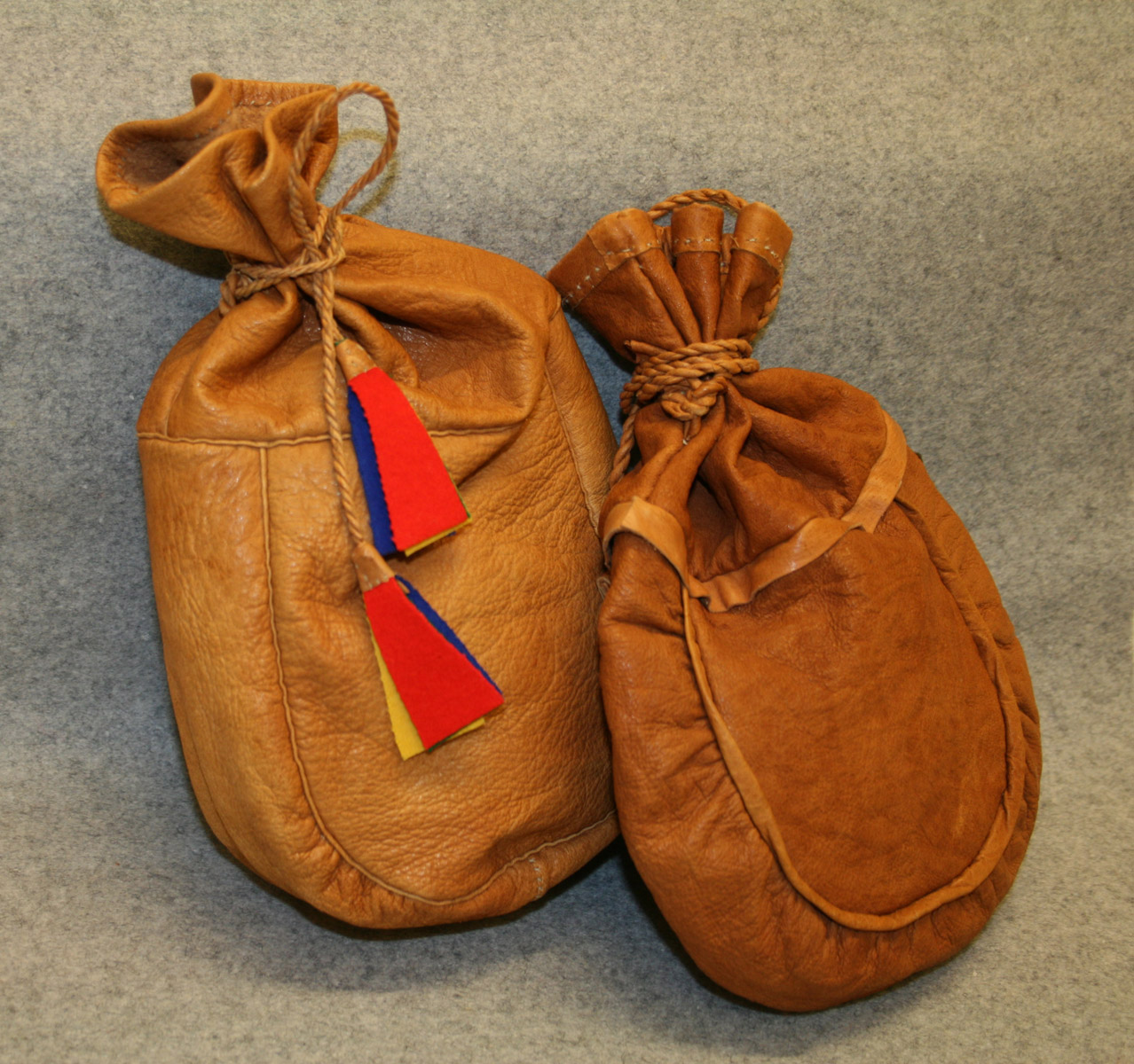 Davvisámegiella: Gáffeseahkka